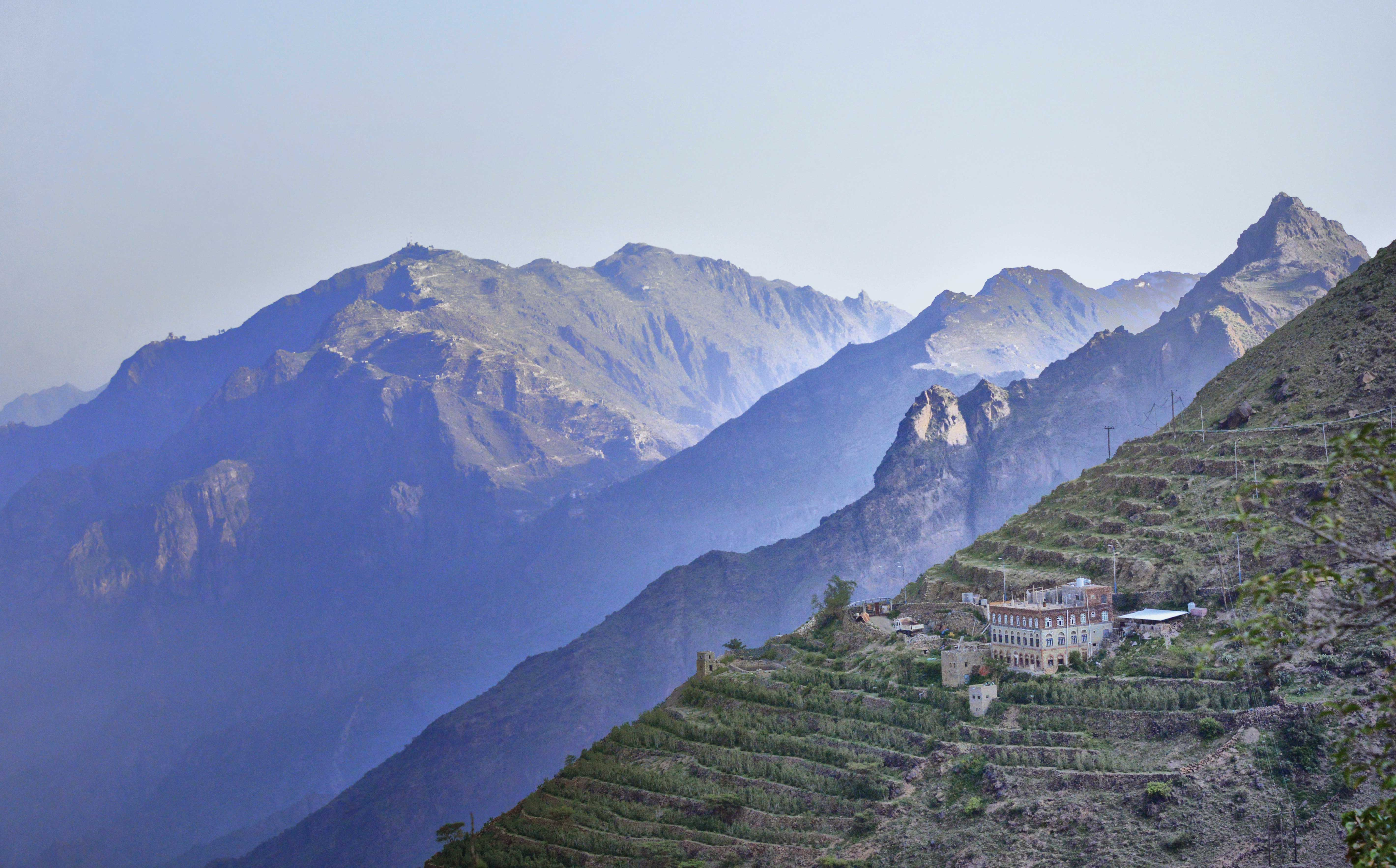 Yemen